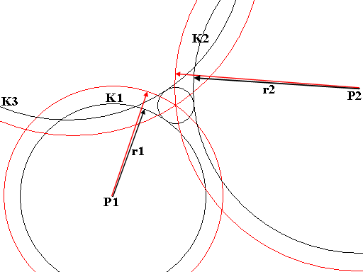 Pseudoranging (2-D) mit 3 Pseudostrecken